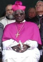 Kardinal Laurent Monsengwo Pasinya